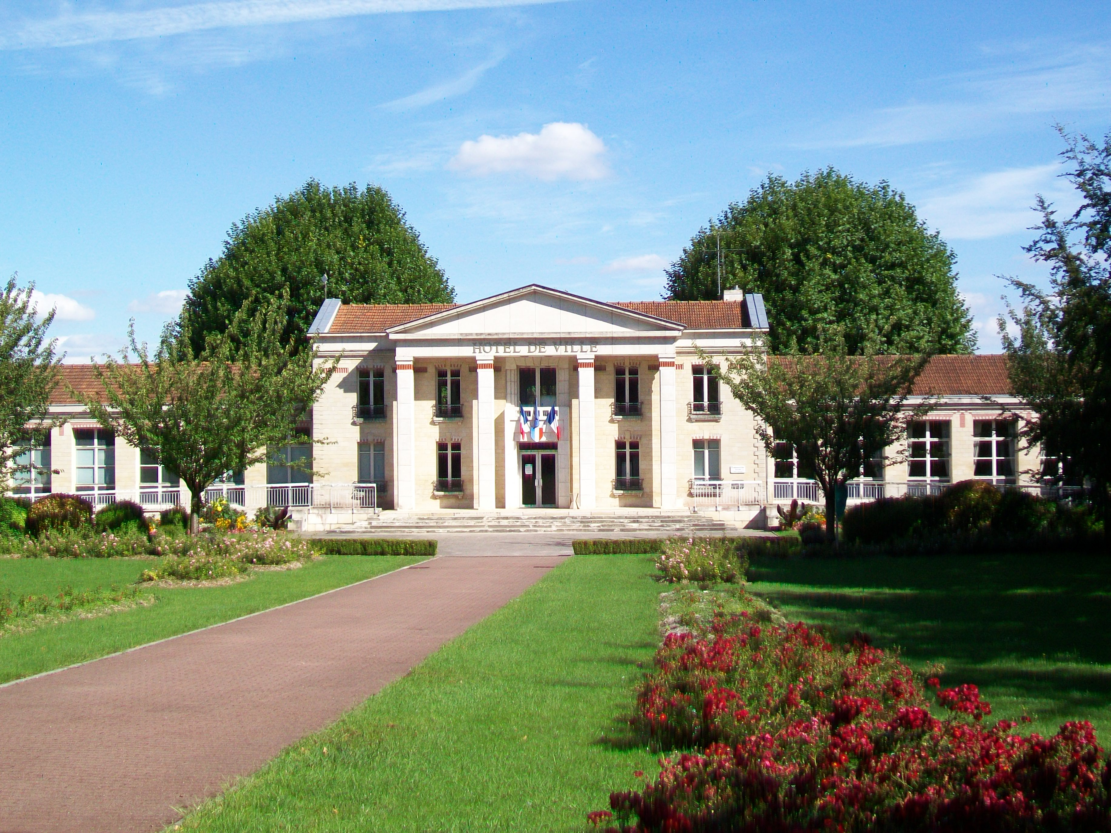 La mairie, établie depuis 1986 dans le premier groupe scolaire de 1910, qui a reçu à l'occasion un péristyle avec fronton et quatre colonnes.